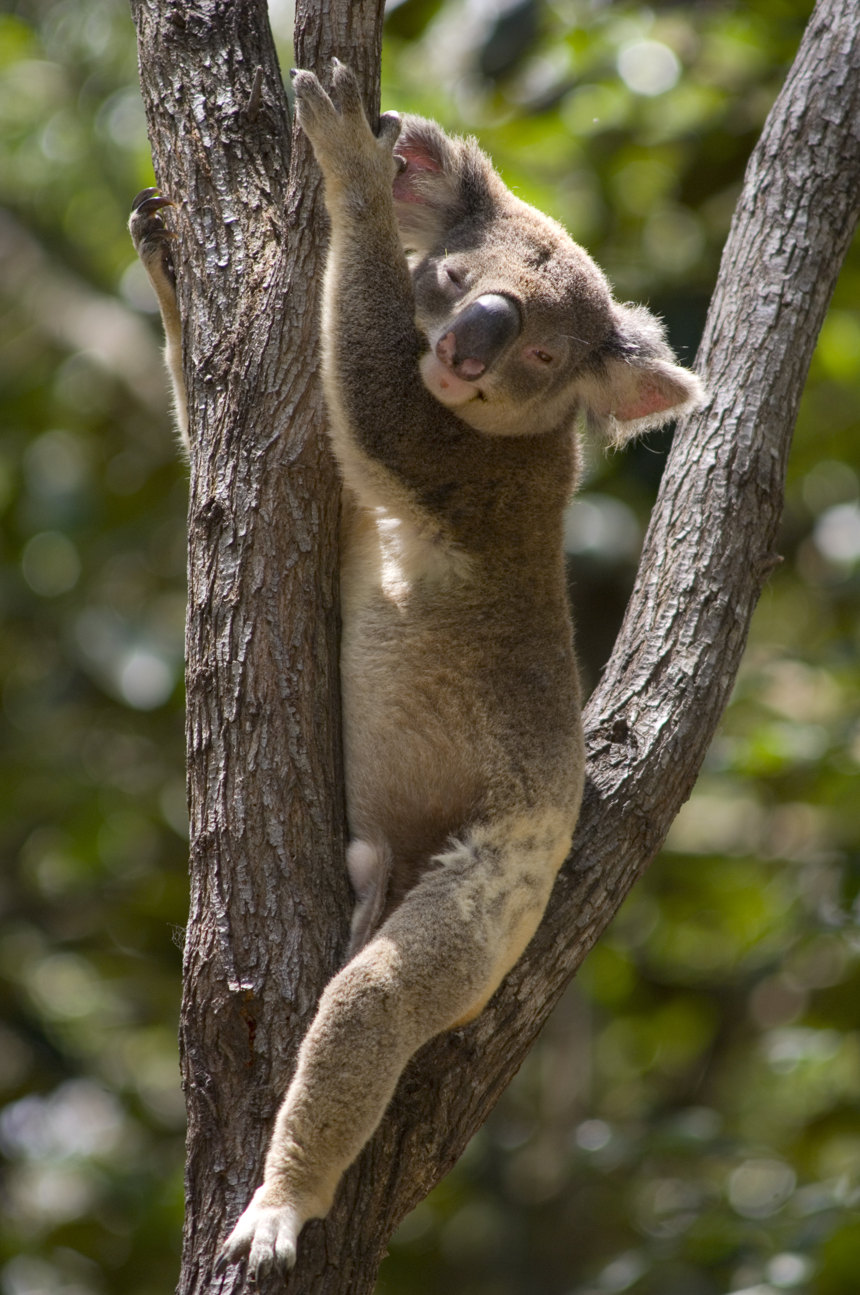 Brisbane Koala Bushlands